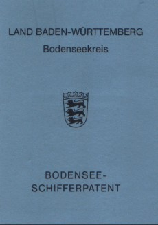 Bodenseeschifferpatent (BSSP), 1. Seite